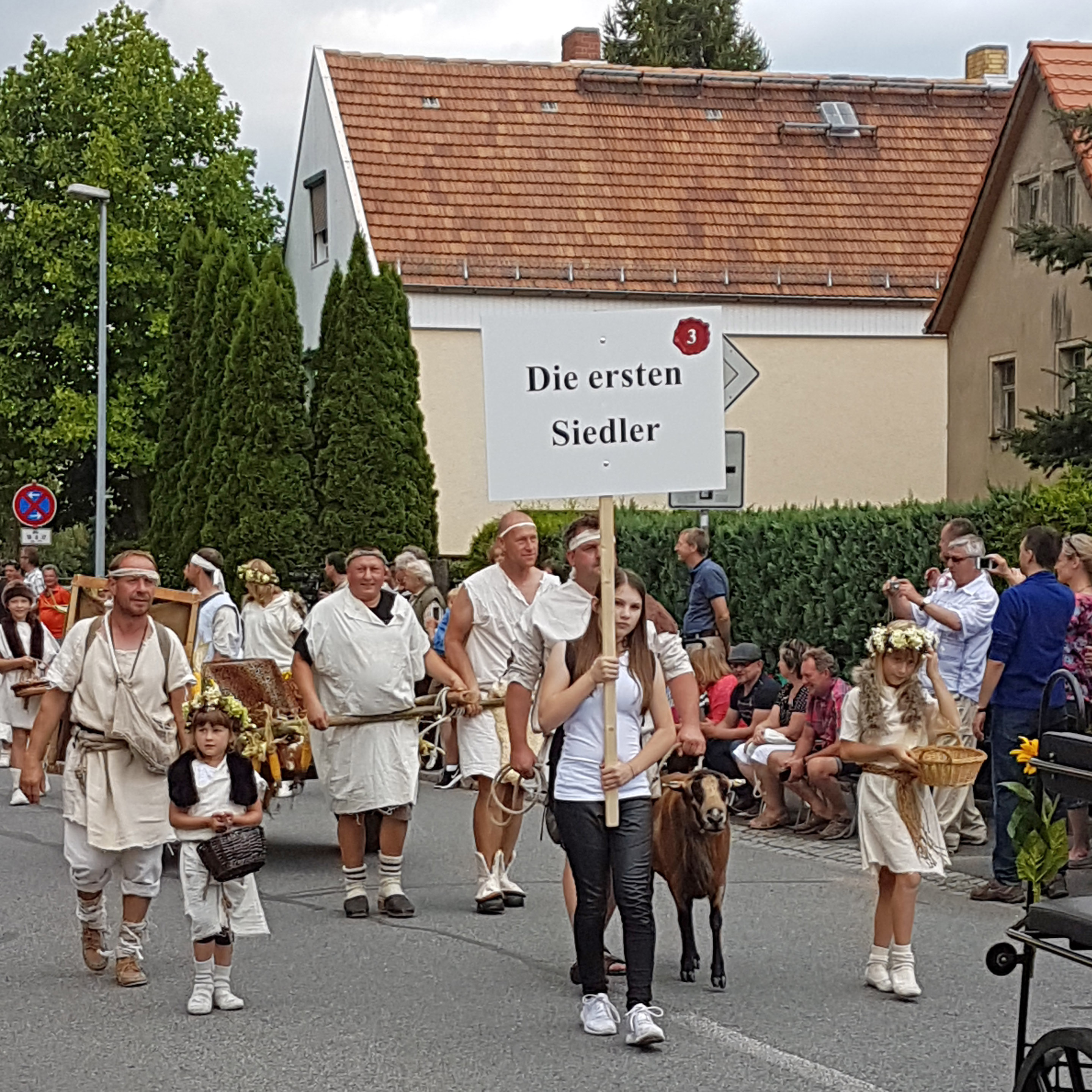 Bild 3 mit den ersten Siedlern von Boxdorf beim Umzug zur 775-Jahr-Feier in Boxdorf (Moritzburg)